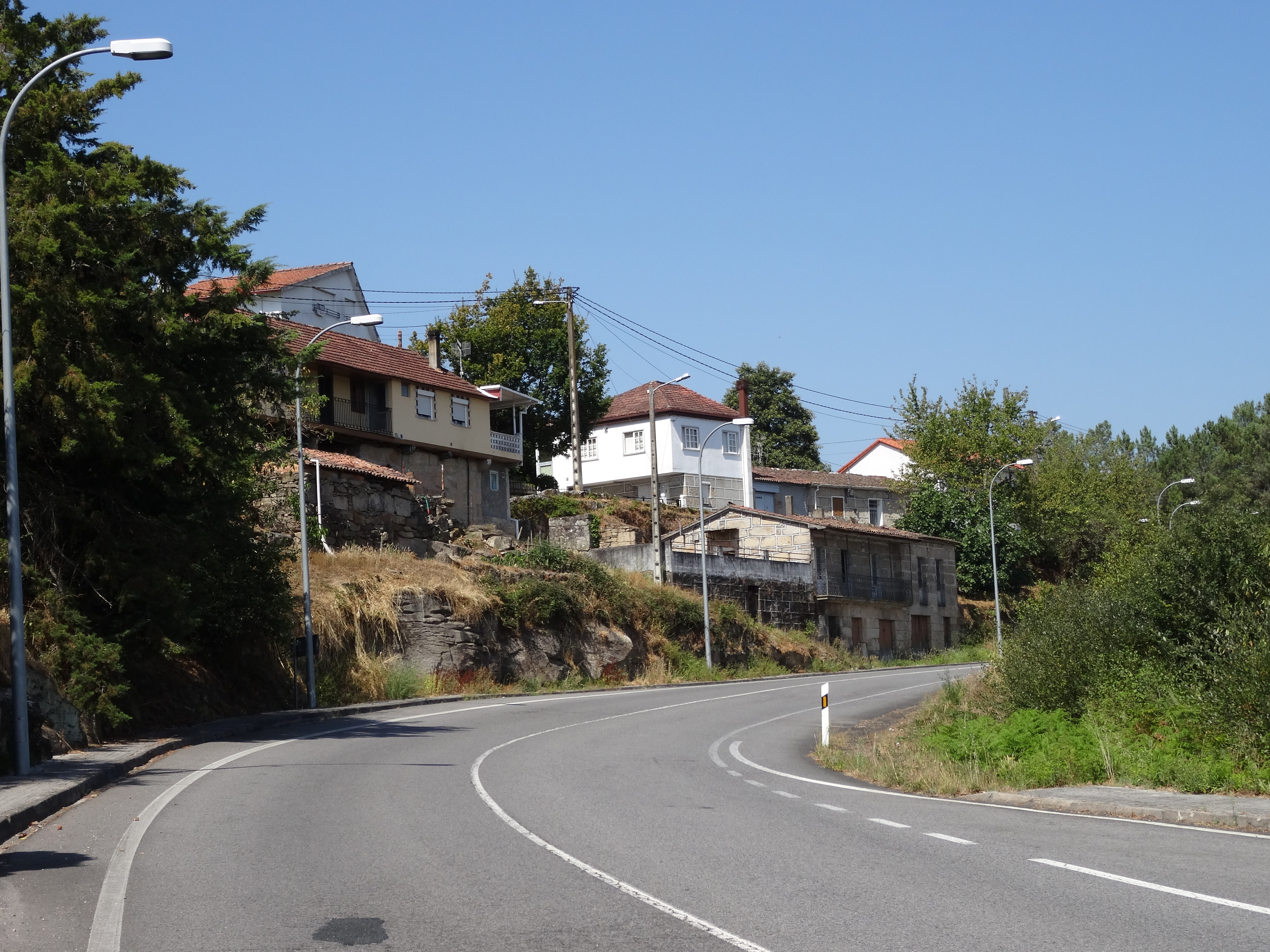 Ver título.